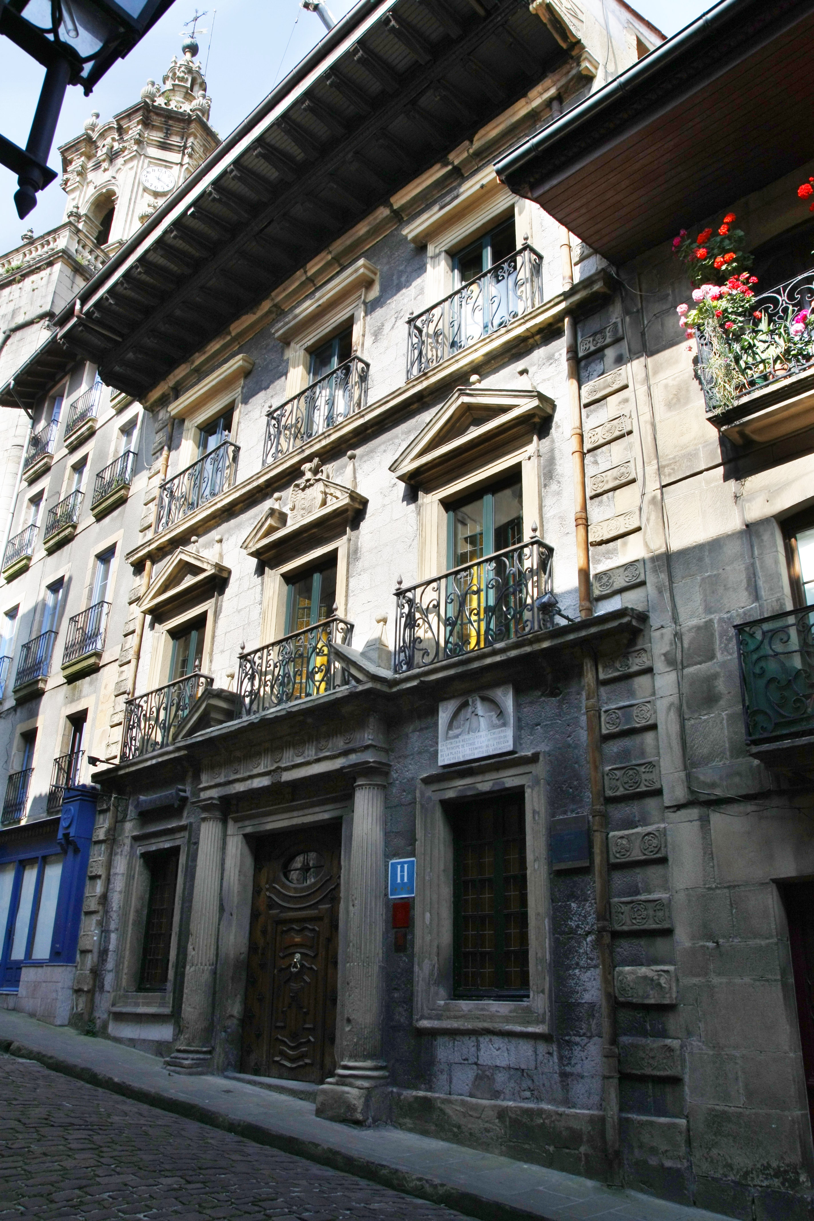 Casa Casdevante - Hondarribia